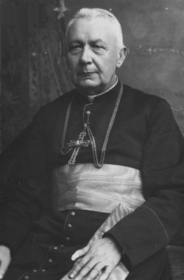 Biskup Grzegorz Chomyszyn